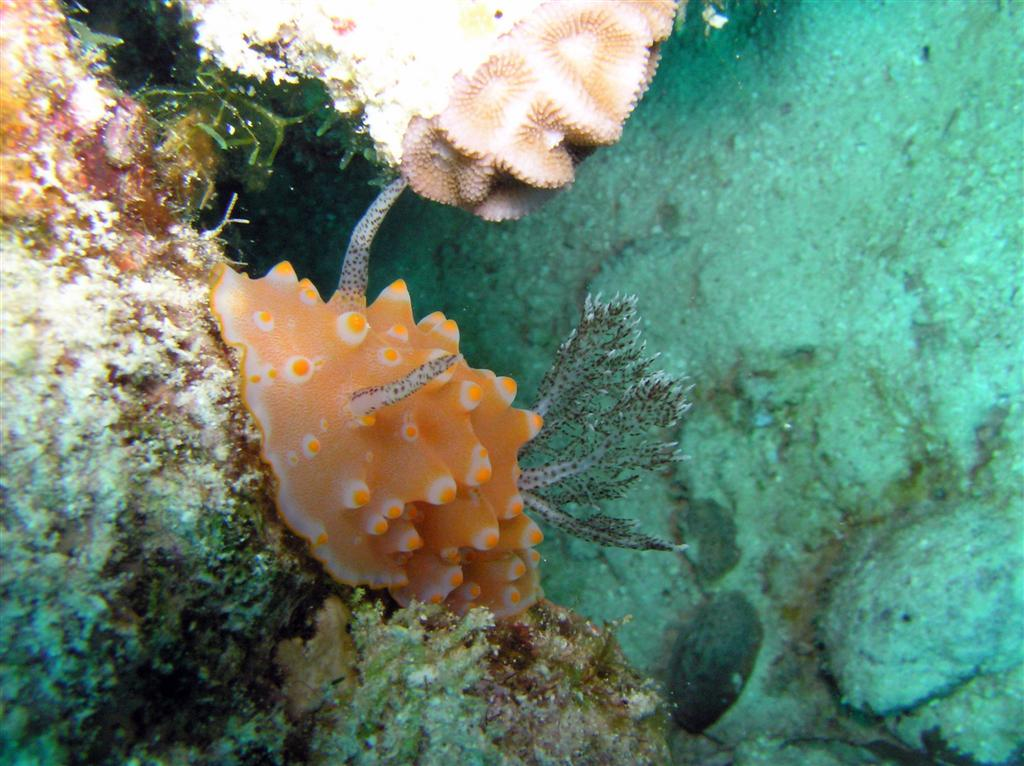 Egypt April 2007